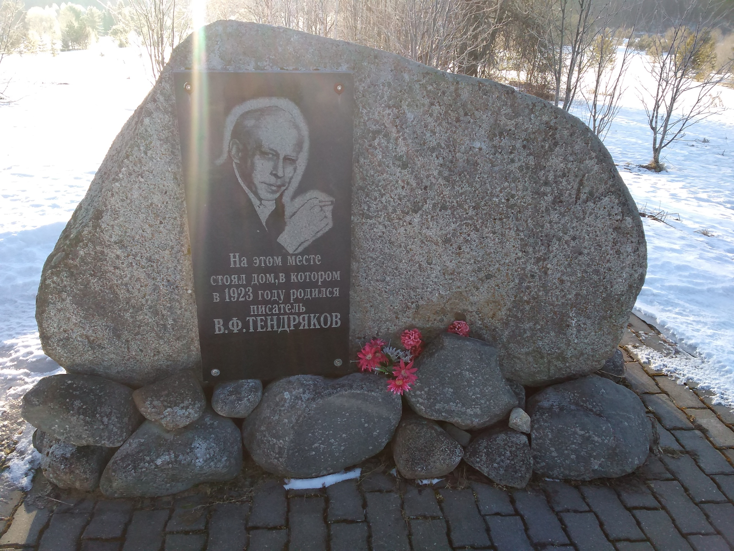 памятник на месте, где находился дом, в котором родился писатель Тендряков